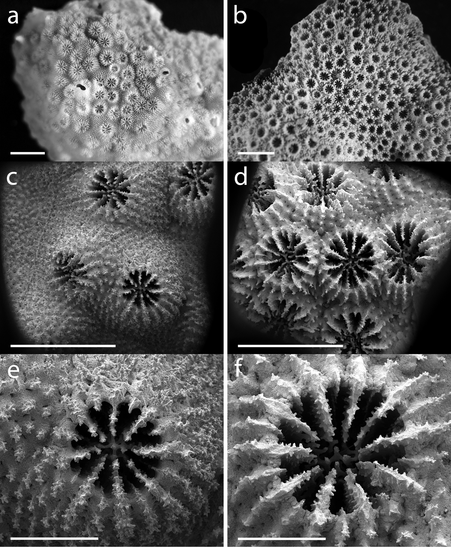 Cyphastrea kausti (a,c,e) y C. microphthalma (b,d,f), coralitos. Bouwmeester J, Benzoni F, Baird AH, Berumen ML (2015) Cyphastrea kausti sp. n. (Cnidaria, Anthozoa, Scleractinia), a new species of reef coral from the Red Sea. ZooKeys 496: 1-13.